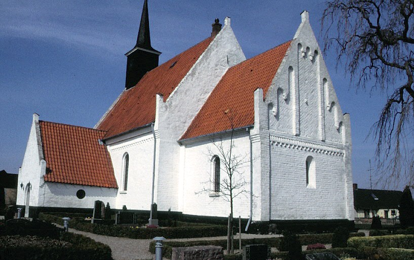 Maglebrænde Kirke i Danmark. Maglebrænde kirke